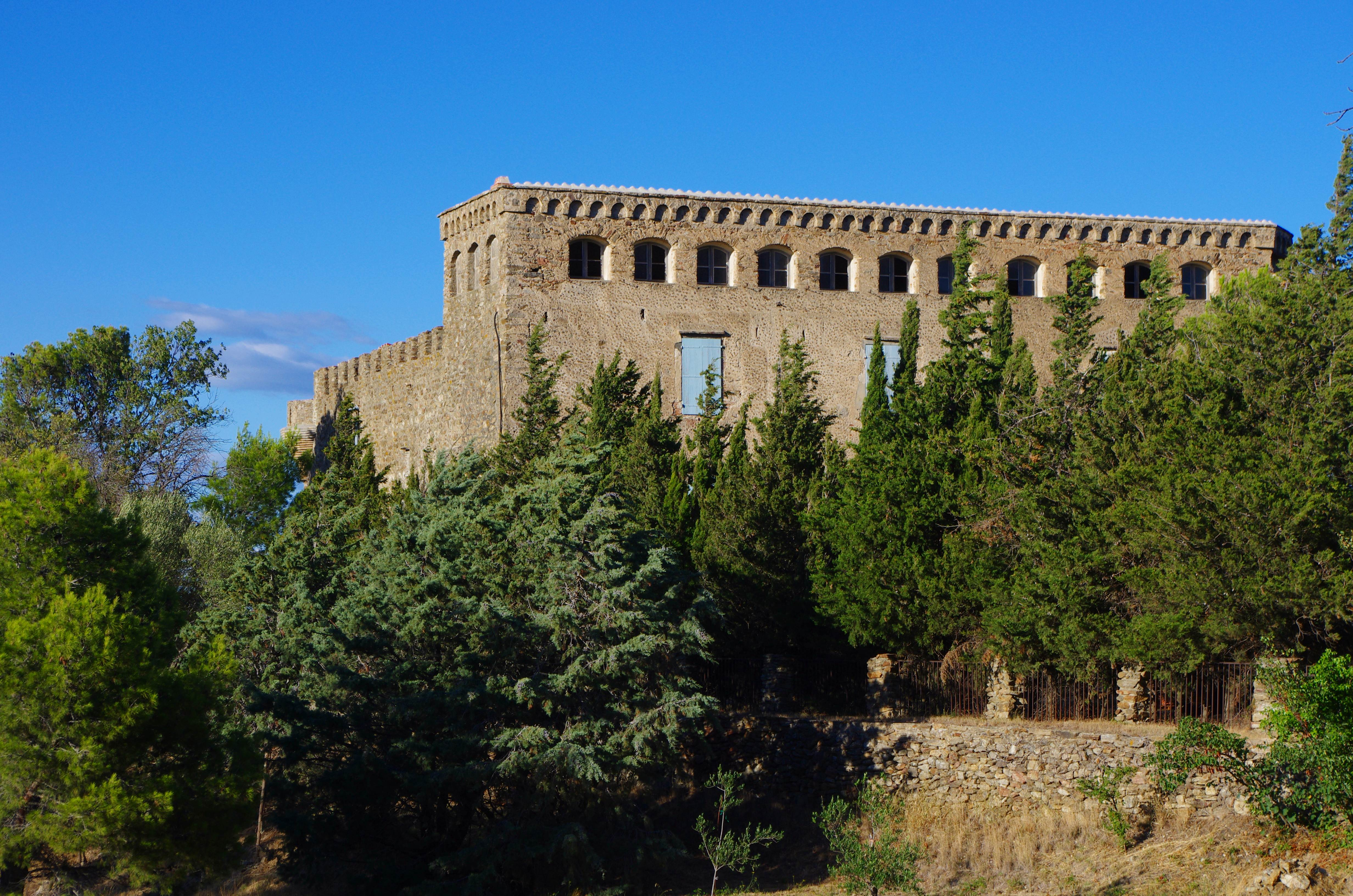 Château de Cuxous prés du village de Cassagne Dep66 (XII-XIIIemSiécle) Château constitué d'une enceinte quadrangulaire qui pourrait dater du 12e siècle. Situé à la frontière de la France et de l'Espagne.